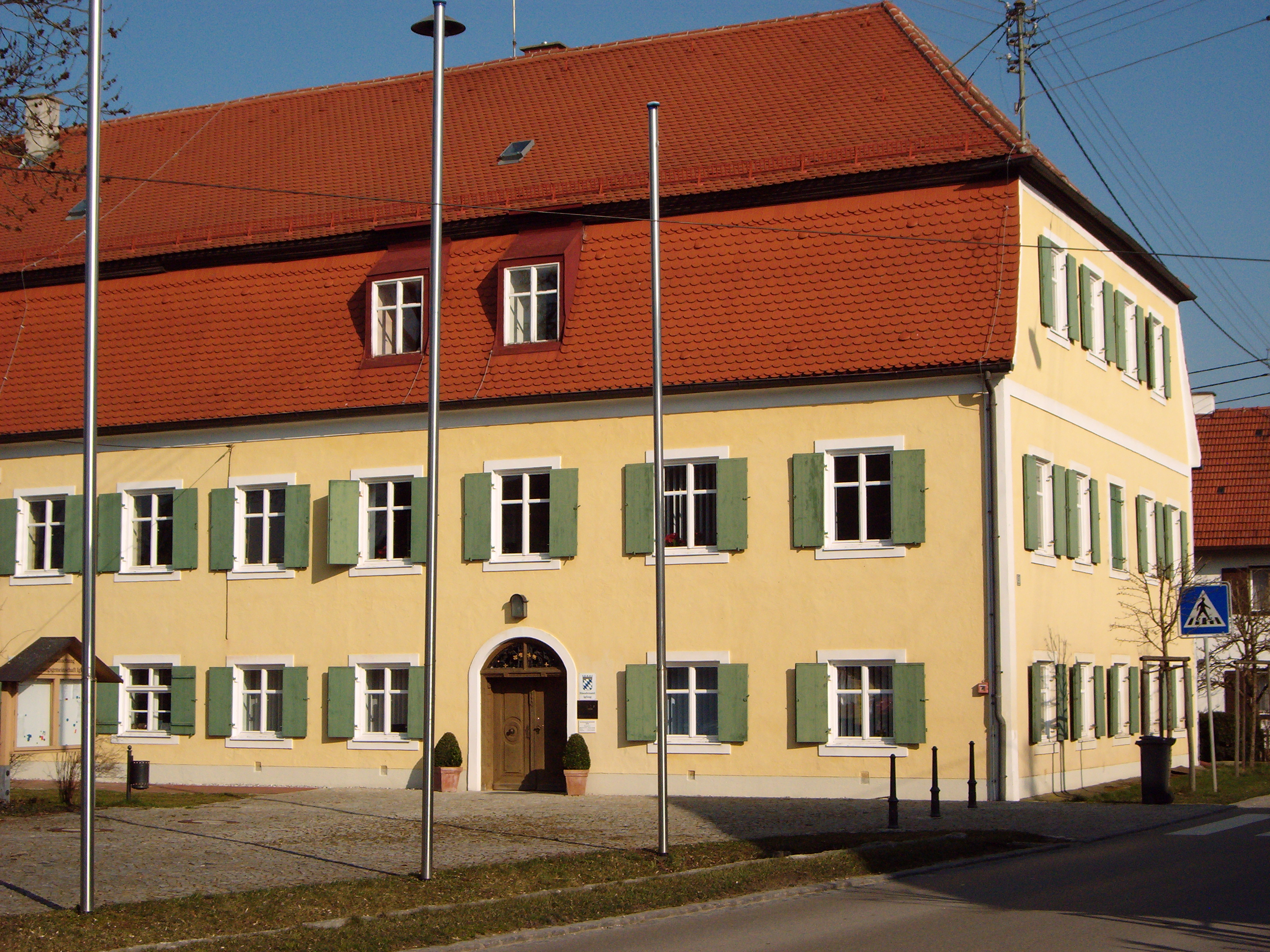 Igling, alter Pfarrhof, heute Sitz der Verwaltungsgemeinschaft Igling